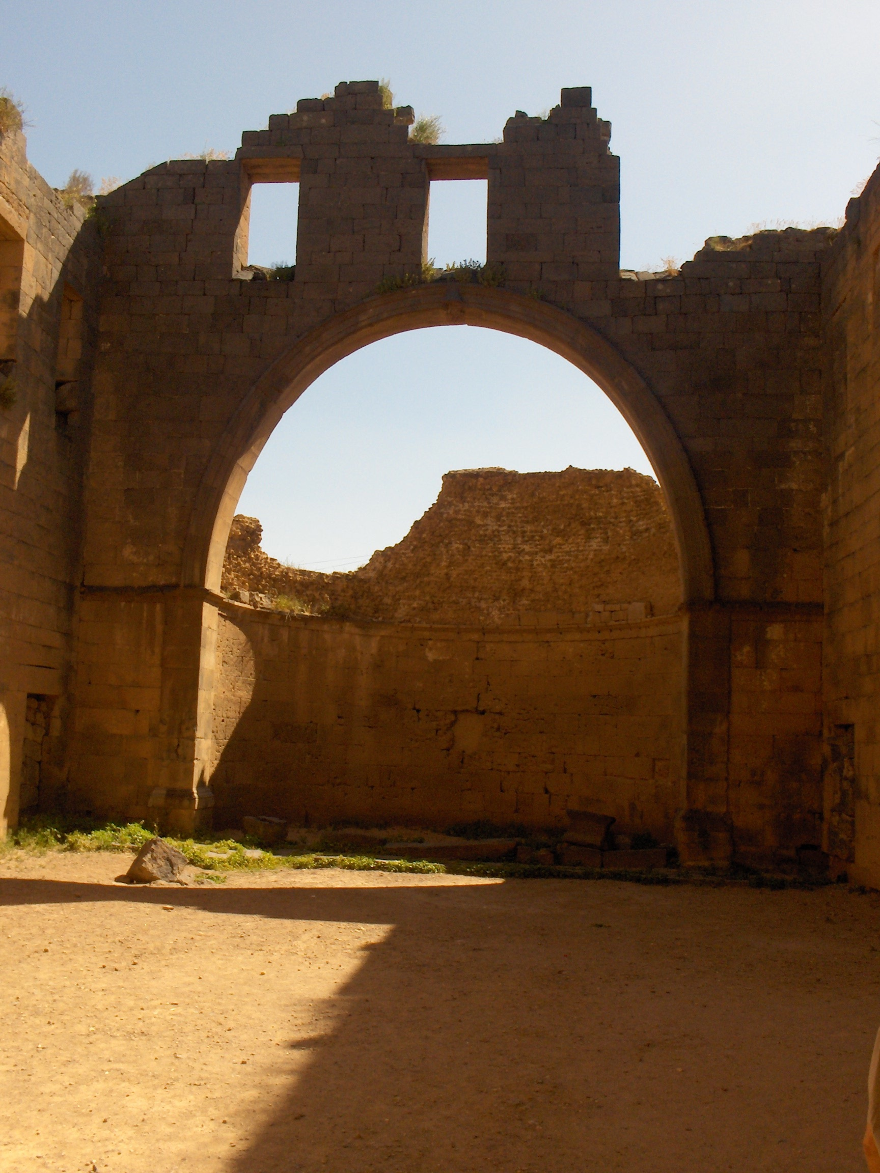 Interno della basilica di Bahira a Bosra, Siria